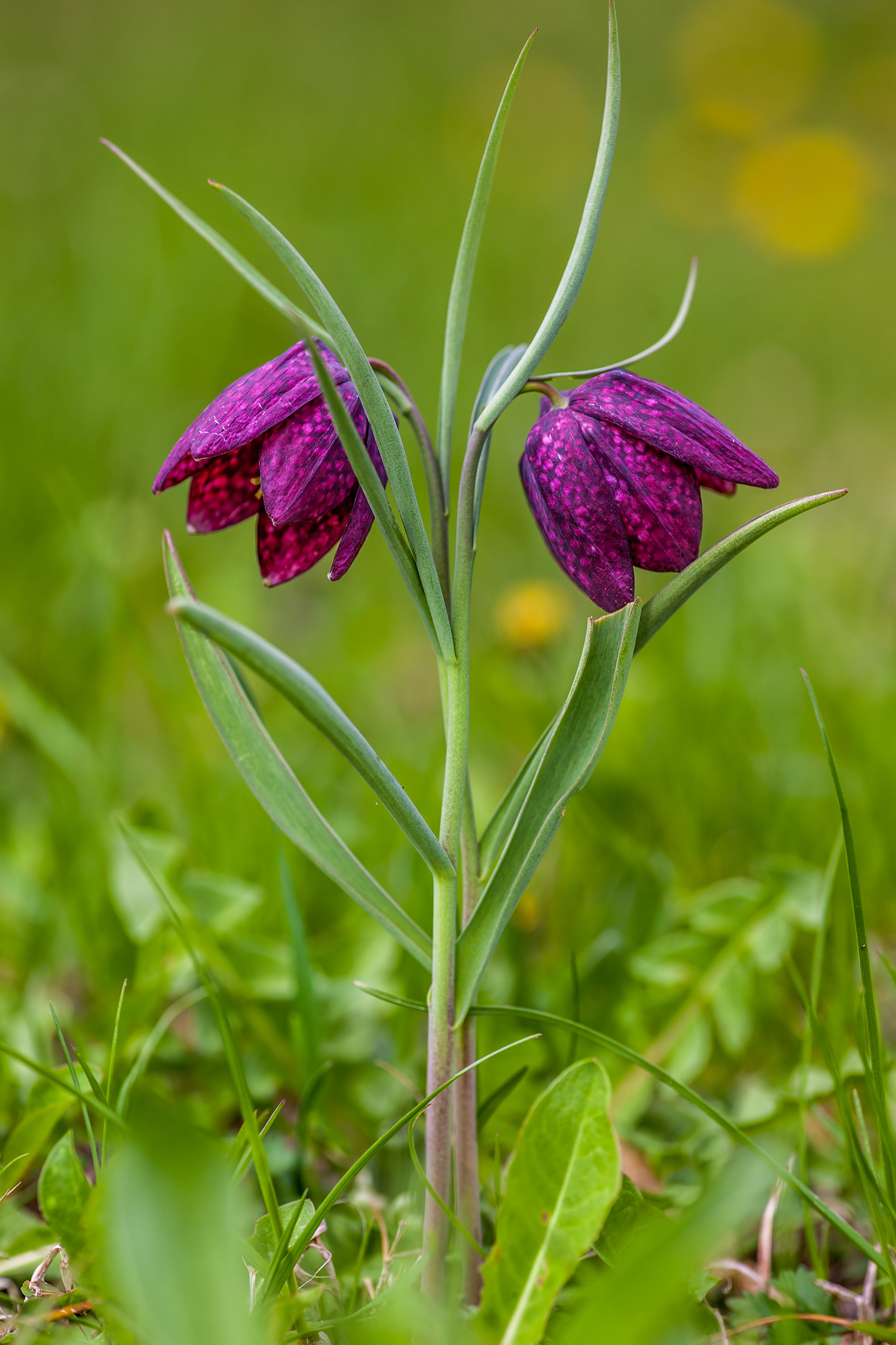 Fritillaria meleagris